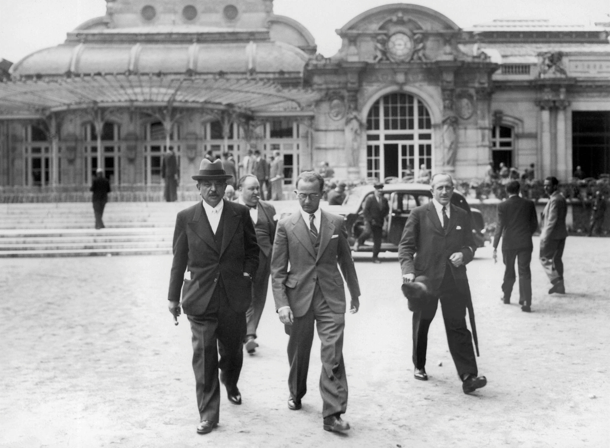 Pierre Laval à la sortie du Grand Casino de Vichy, le 10 juillet 1940, jour du vote à l'Assemblée nationale des pleins pouvoirs au maréchal Pétain.